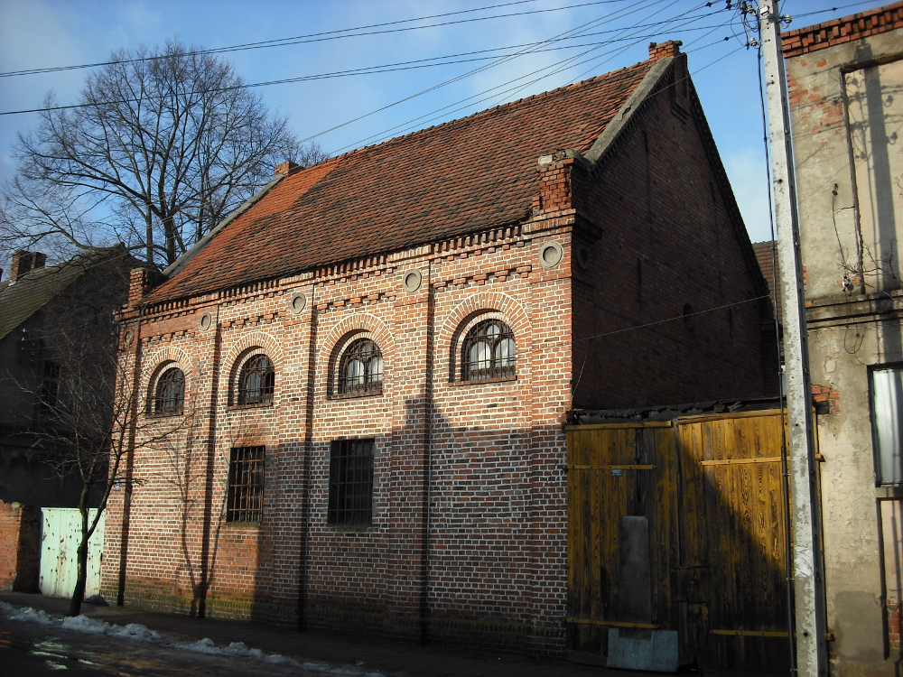 Zdęcie synagogi w Wyrzysku z dnia 2011 01 12